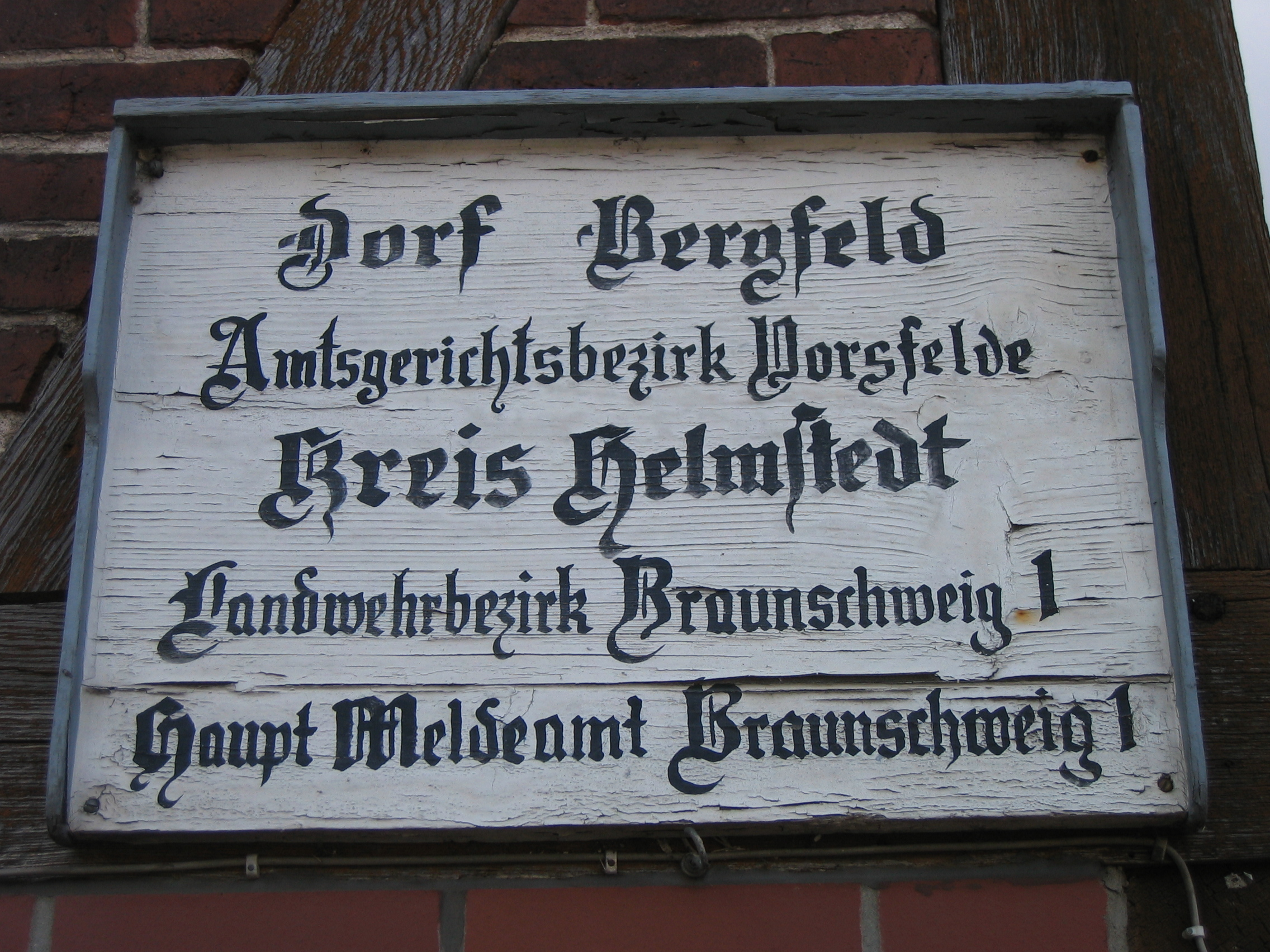 Altes Ortsschild, das die ehemalige Einordnung Bergfelds in die Verwaltungsstruktur der Region zeigt.